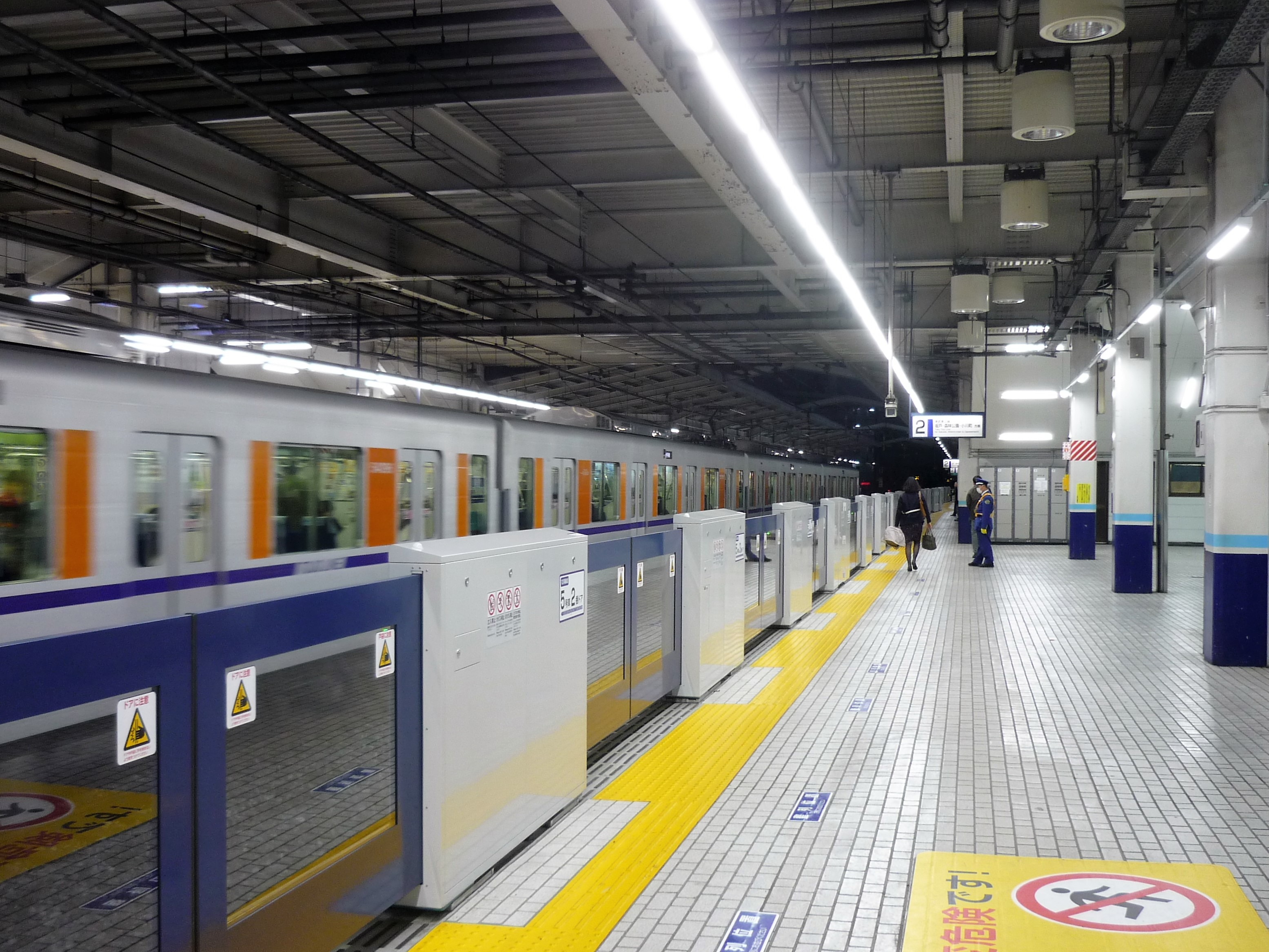 東武東上本線川越駅2番ホーム（ホームドア設置後） Panasonic Lumix DMC-FS3